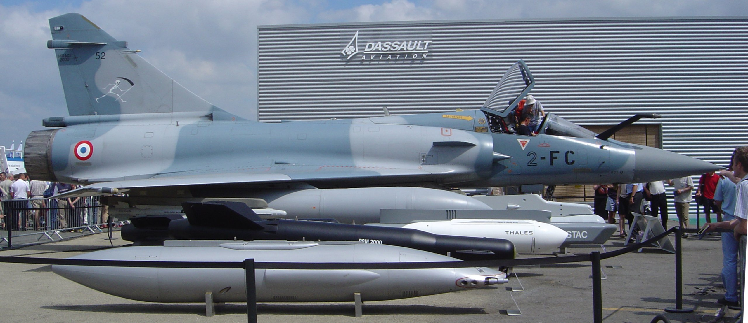 French Dassault Mirage 2000. Paris Air Show, 2005